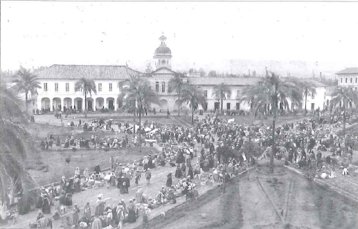 Es el lugar de encuentro de la población